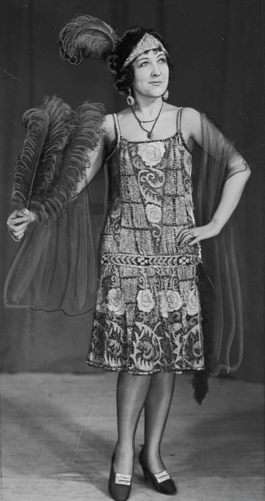 Program „Mira i satyra”; Warszawa; na deskach Mira Zimińska-Sygietyńska.